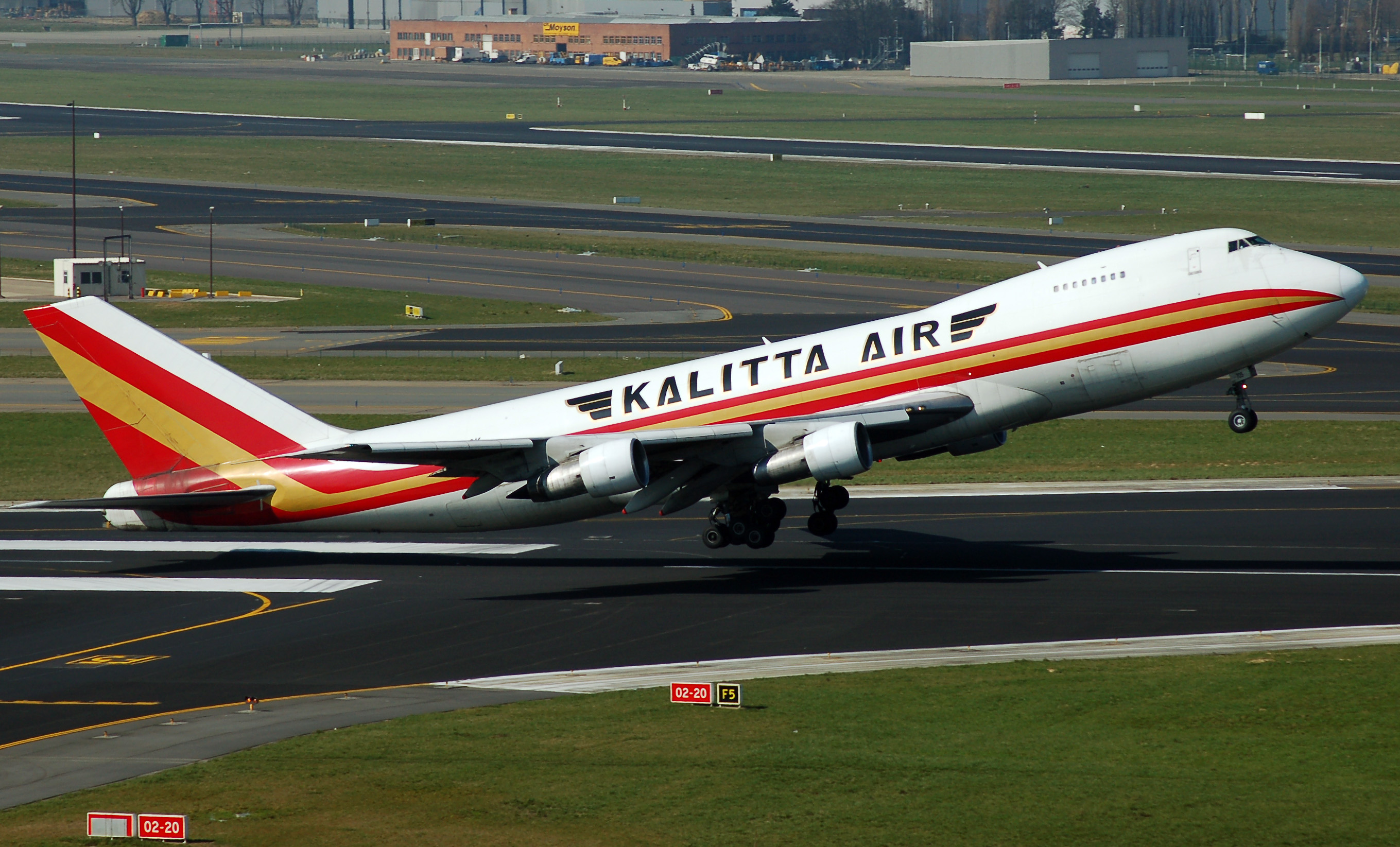 Boeing 747-200, Kalitta Airlines